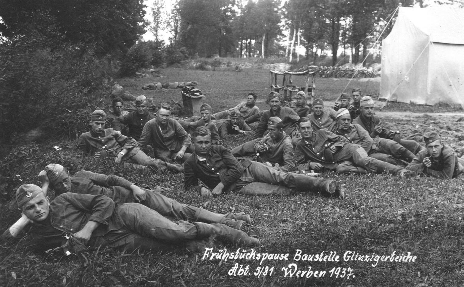 picture description on de-wp: Frühstückspause für Abteilung 5/81 beim Reichsarbeitsdienst in 1937 Members of the Reichsarbeitsdienst, Section 5/81 in 1937